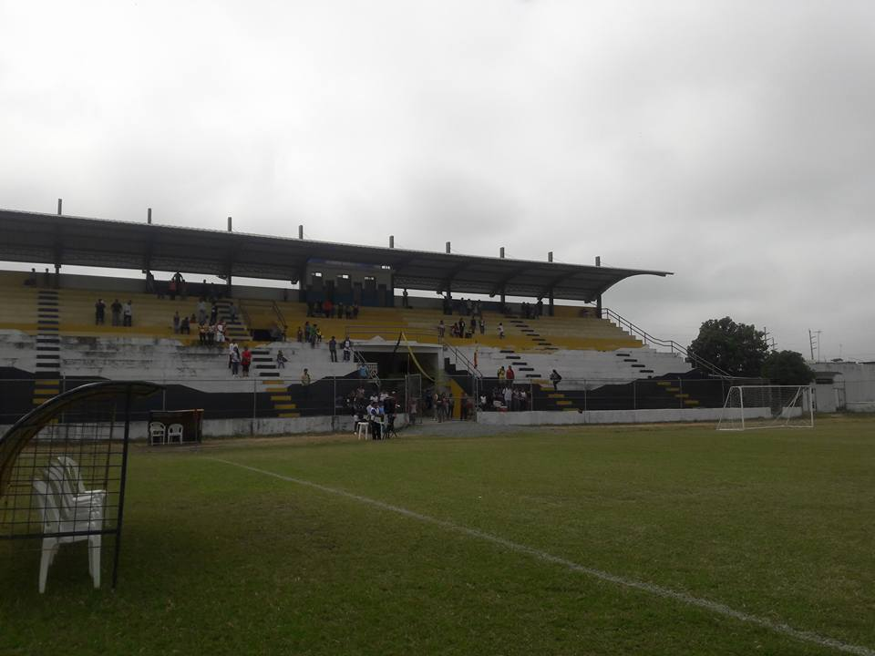 El Estadio Los Daulis Vista Desde El centro De la Cancha